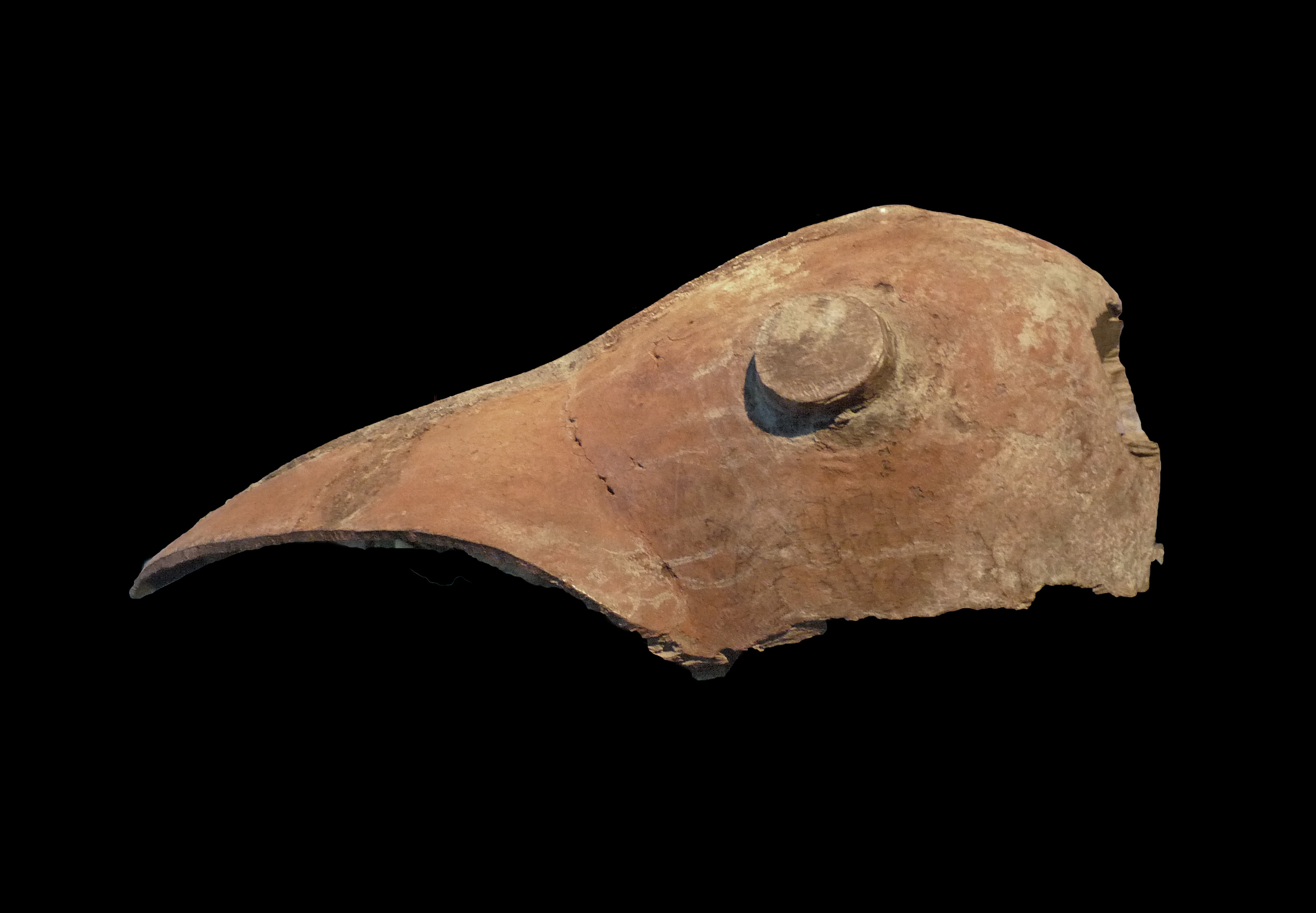 Sura : masque horizontal Gugwang. Première moitié du XXe s. Bois, pigment, poudre de camwood. Musée du quai Branly.